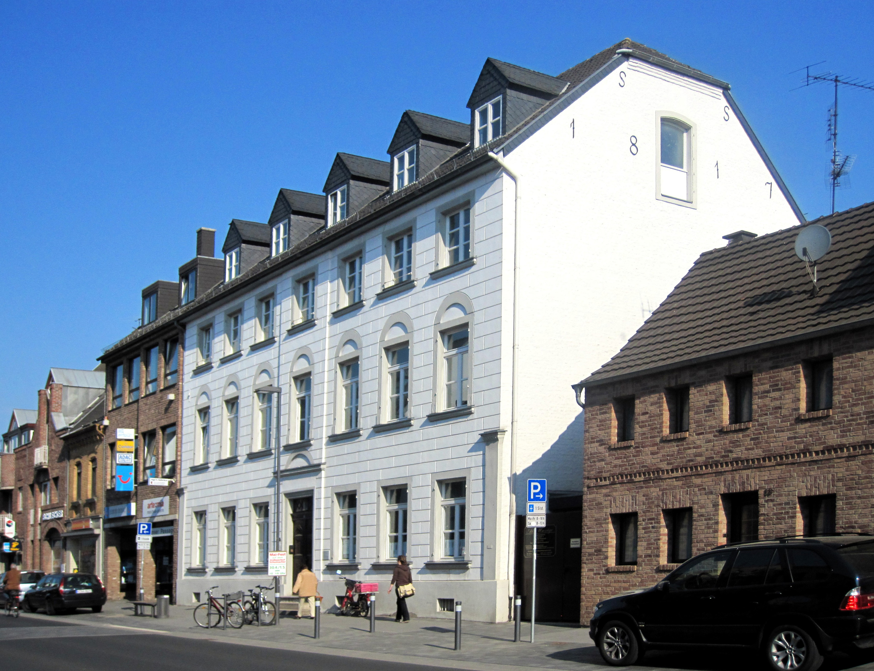 Lechenich Bonner Straße 11